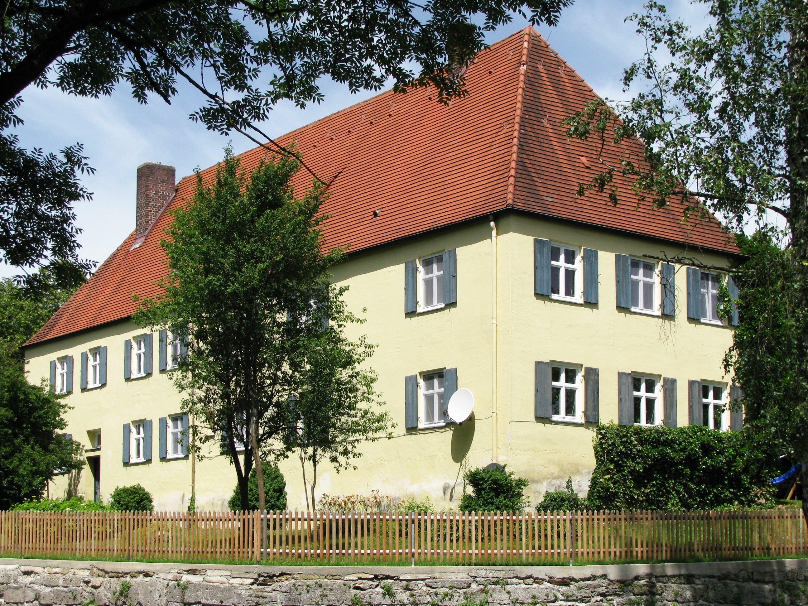 Sindelsdorf, Kirchsteinstraße 1; Pfarrhaus, stattlicher Walmdachbau, 1807/08 unter Benützung der abgegangenen Marienkirche errichtet. This is a photograph of an architectural monument.